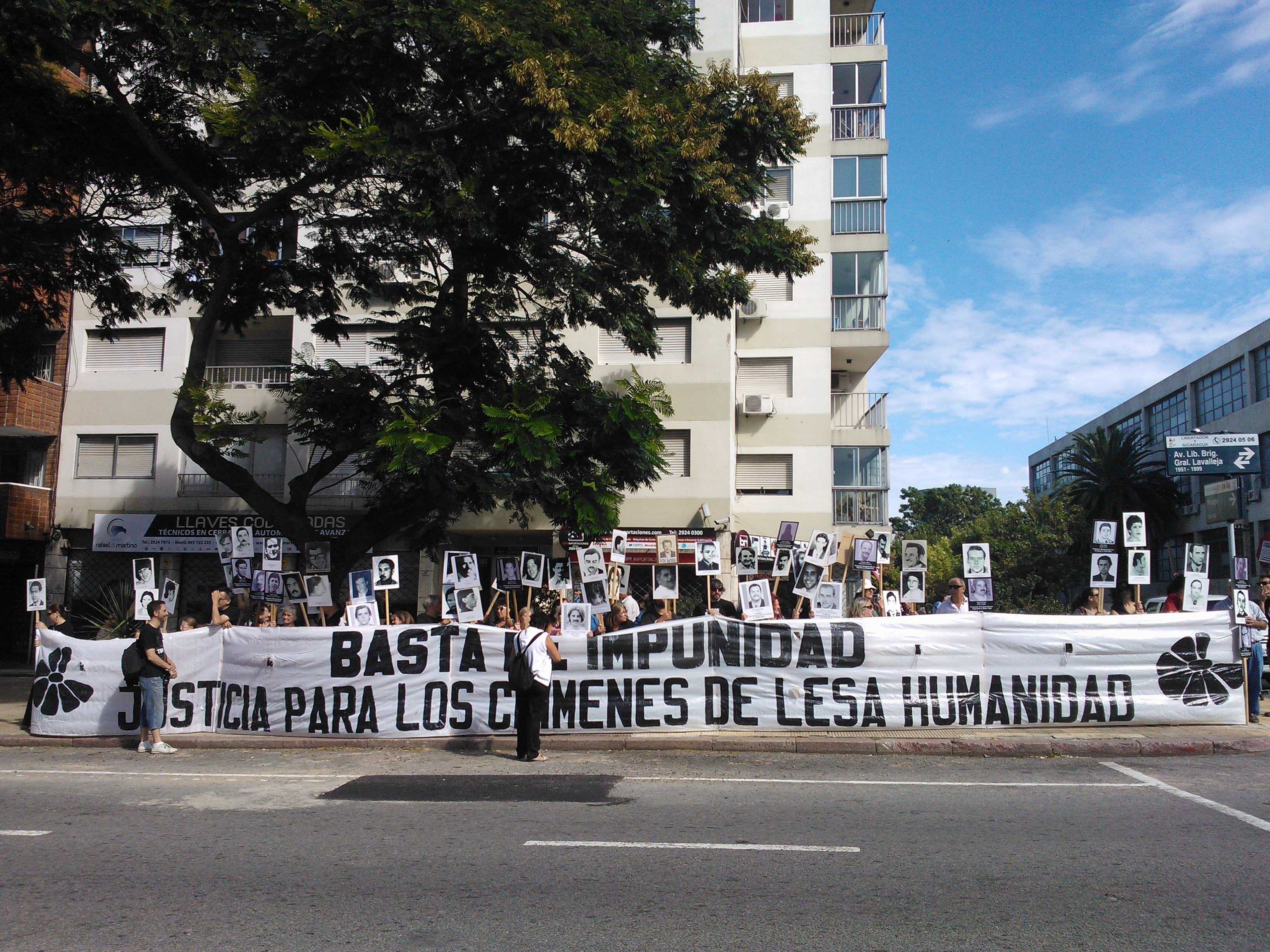 Asunción de mando de Tabaré Vázquez, 1 de marzo de 2015. Manifestantes por Avda del Libertador con fotos de los detenidos desaparecidos durante la dictadura de la década de 1970. Agrupación "Madres y familiares de Detenidos Desaparecidos".